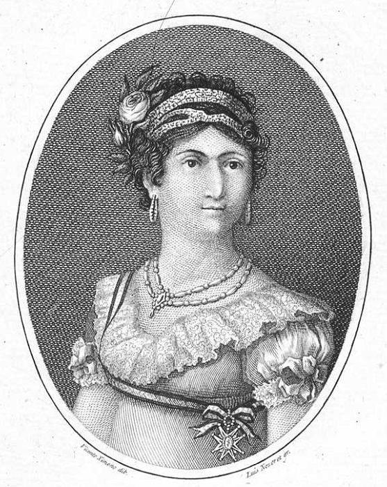 María Francisca de Braganza, infanta de España.